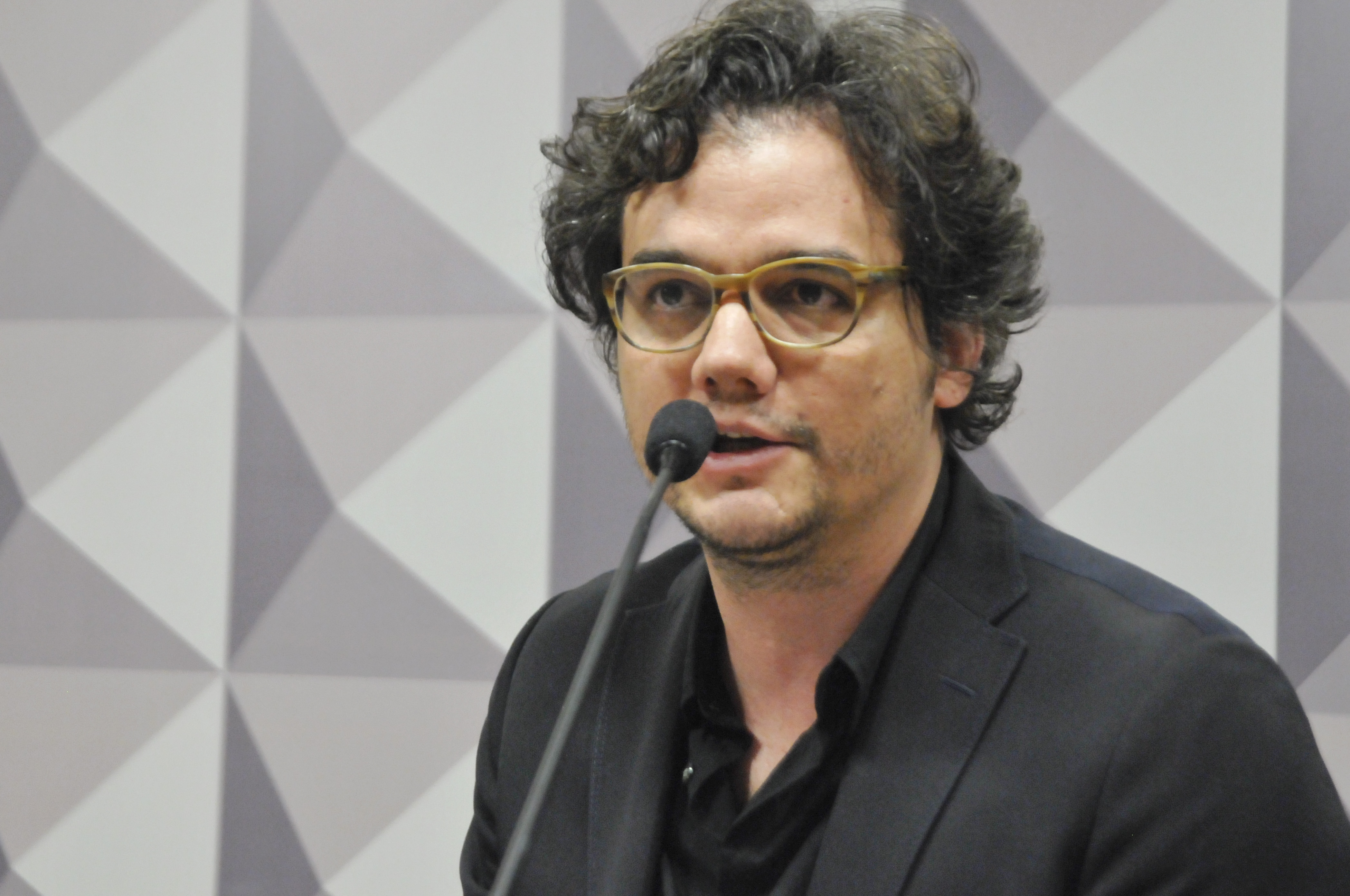 Comissão de Direitos Humanos e Legislação Participativa (CDH) realiza audiência pública com Ciclo de Debates sobre “O mundo do trabalho: desemprego, aposentadoria e discriminação”, com foco no trabalho escravo. Em pronunciamento, embaixador da Organização Internacional do Trabalho (OIT) e ator, Wagner Moura Foto: Geraldo Magela/Agência Senado